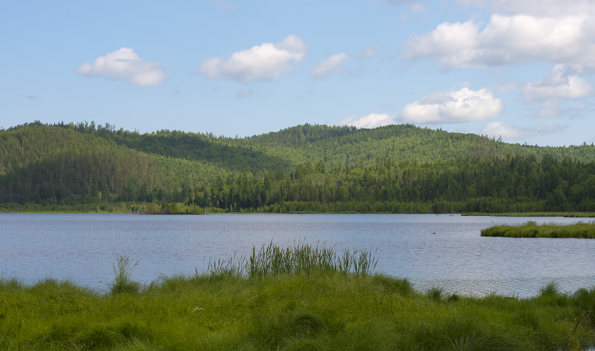 Озеро Колок, Прибайкальский район, республика Бурятия, Российская федерация This image is related to the protected area of Russia number 0310226